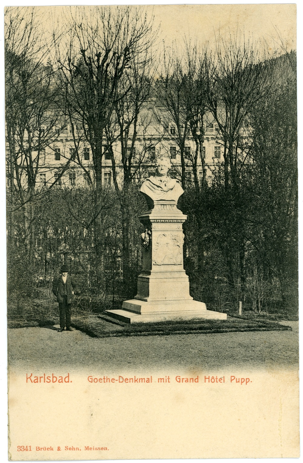 Karlsbad; Goethe-Denkmal mit Grandhotel Pupp This postcard is from publisher Brück & Sohn in Meißen ( This postcard has a unique number 03341 and is available in a higher resolution at the publisher. This images was uploaded in a cooperation project between Wikipedians and the publisher.